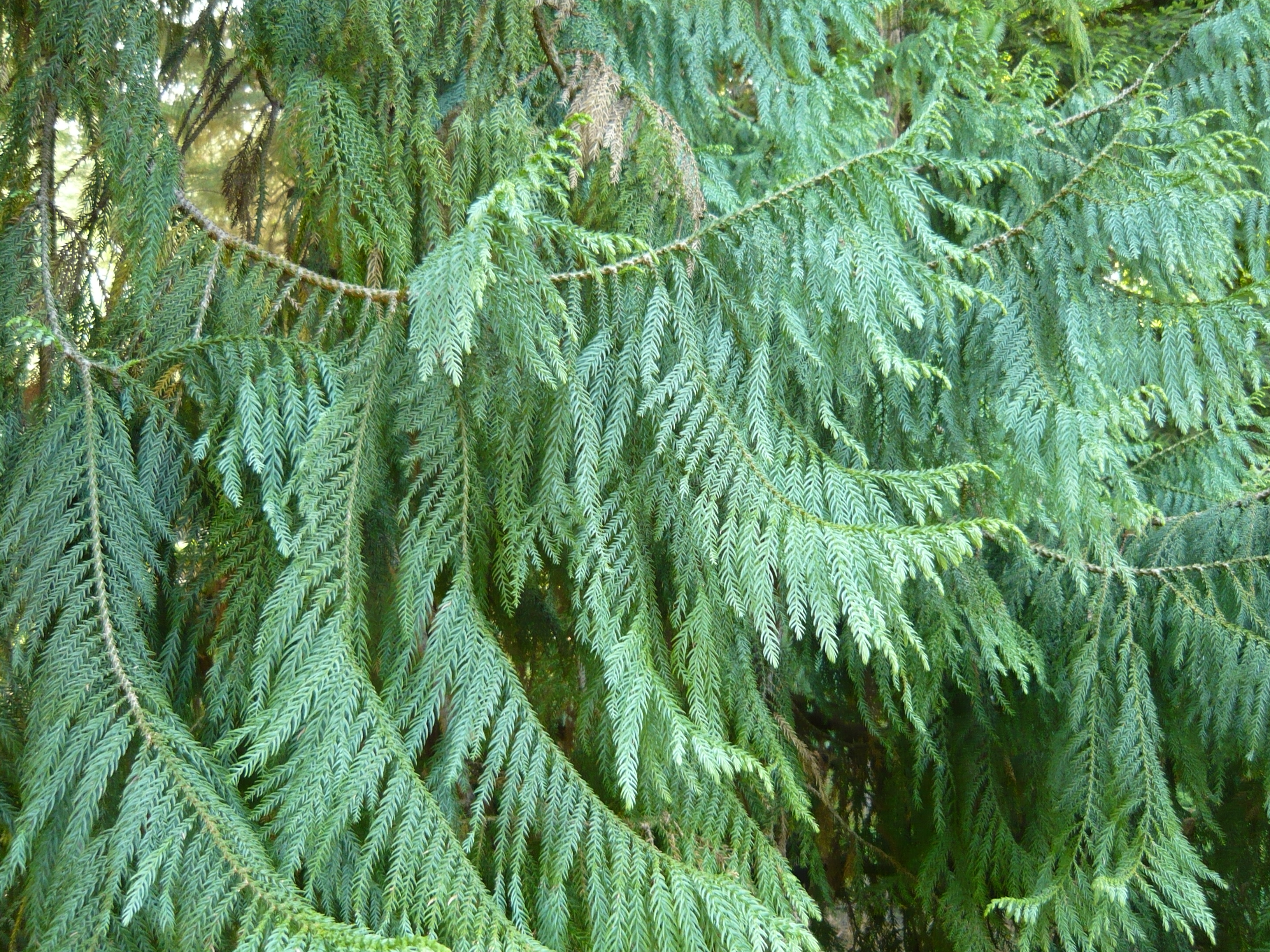 Taiwania cryptomerioides. Real Jardín Botánico de Madrid.